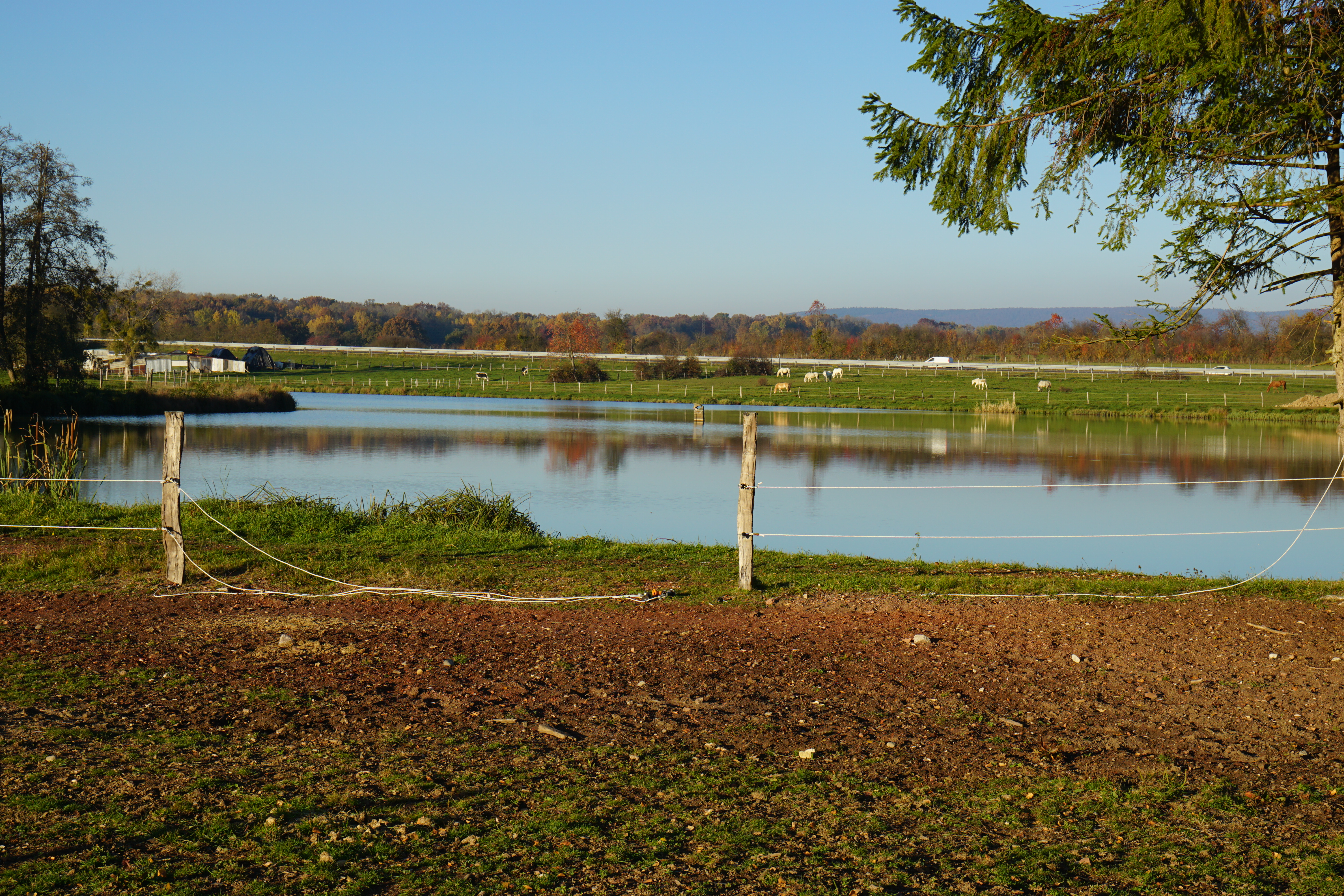 Le centre équestre de Lyoffans (70).